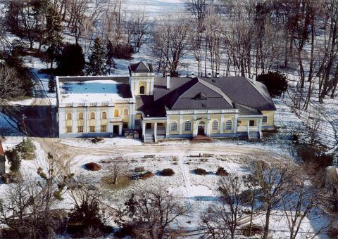 Csetény, Hungary, aerial photograph